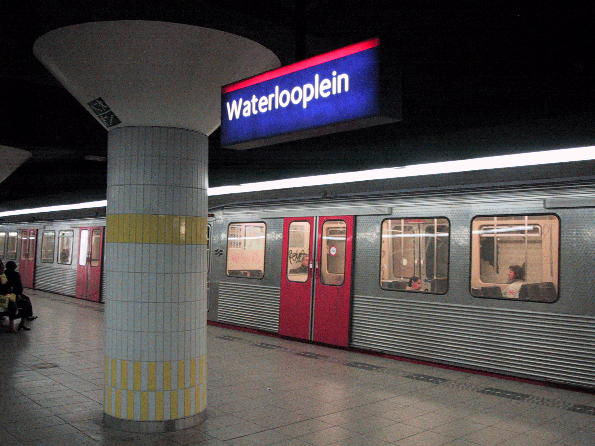 Me - 26/11/2005 - AMS waterlooplein